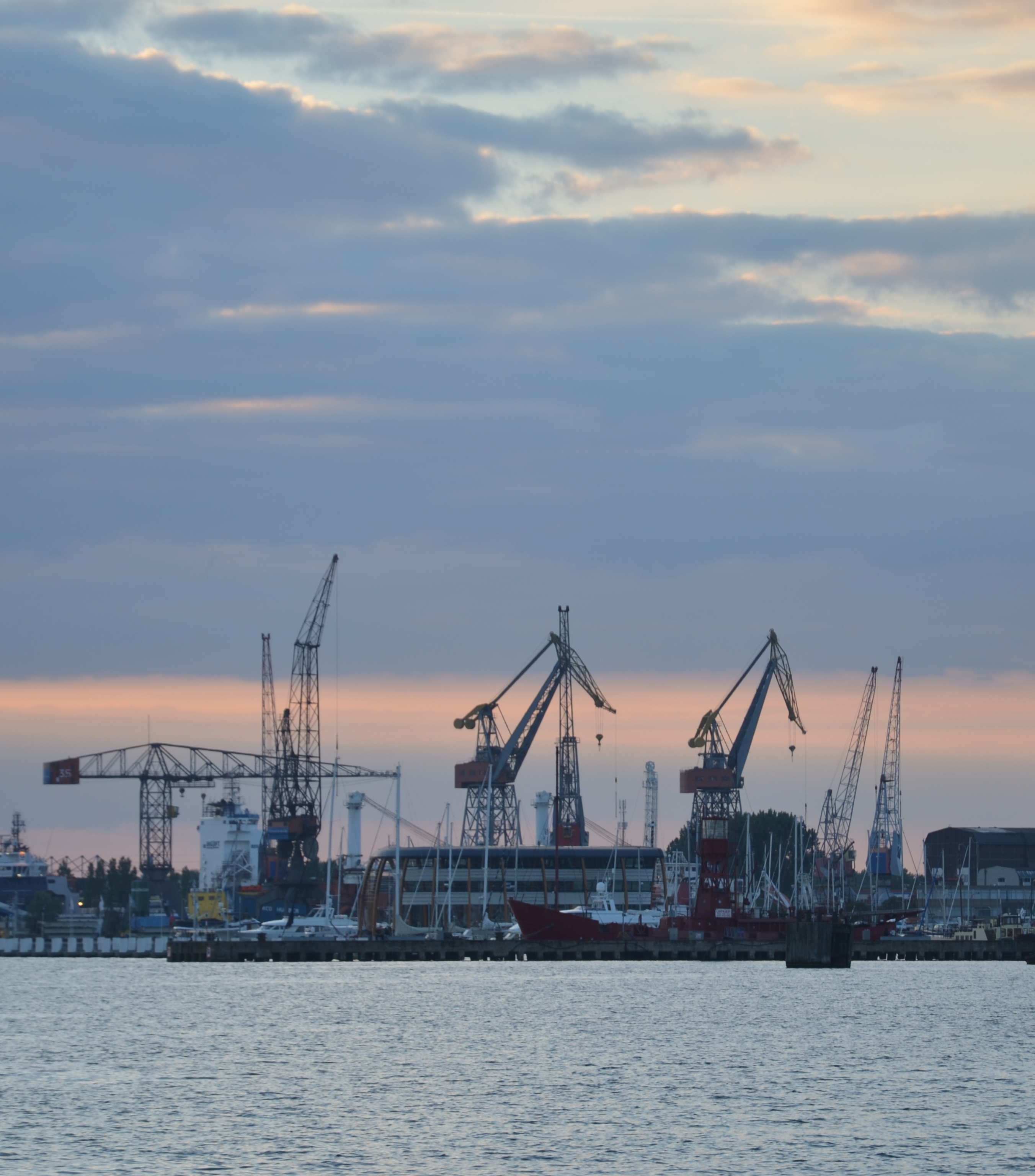 Het NDSM-terrein in Noord-Amsterdam vanaf het Noordzeekanaal.